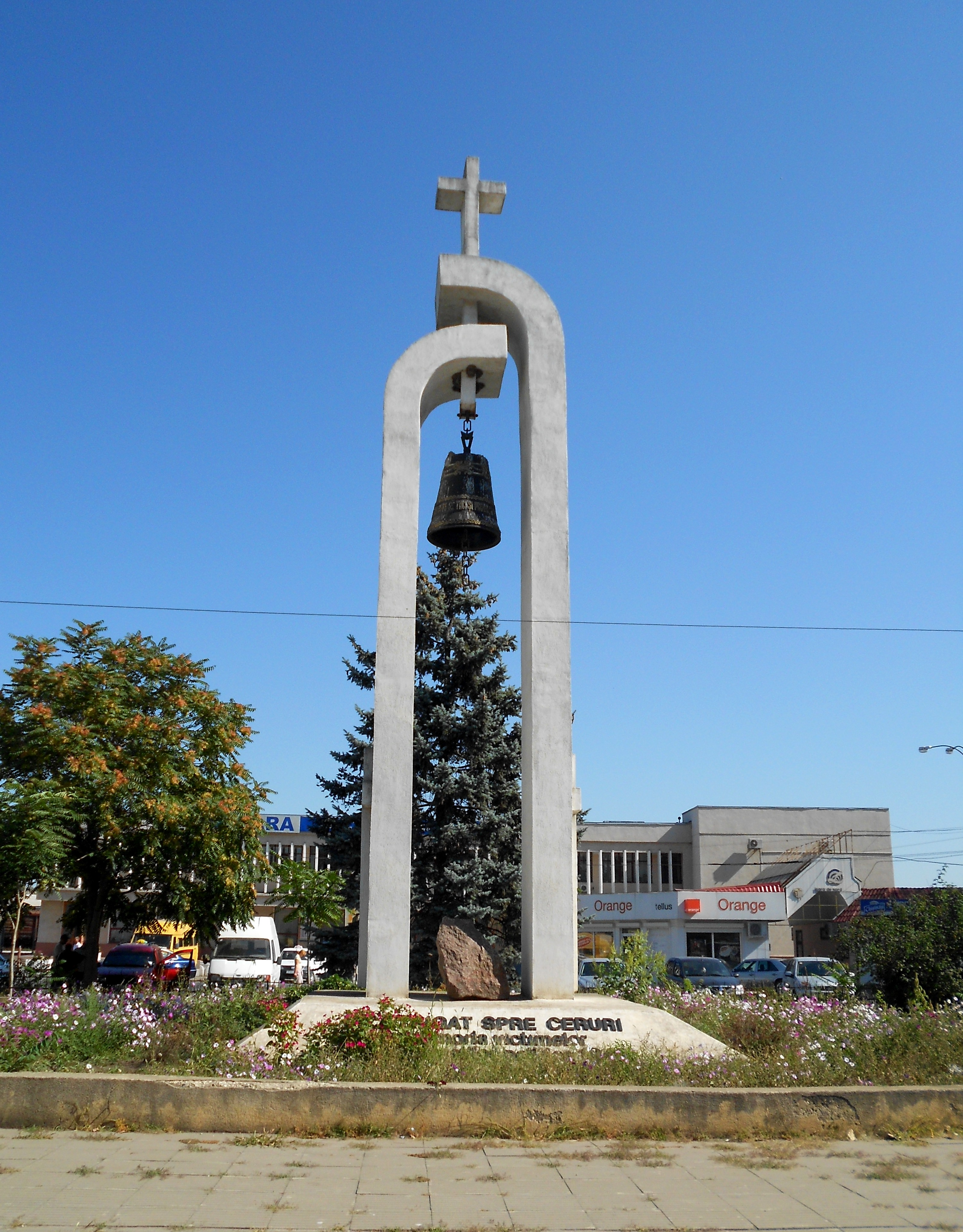 Monumetul represiunilor regimului comunist din Bălți